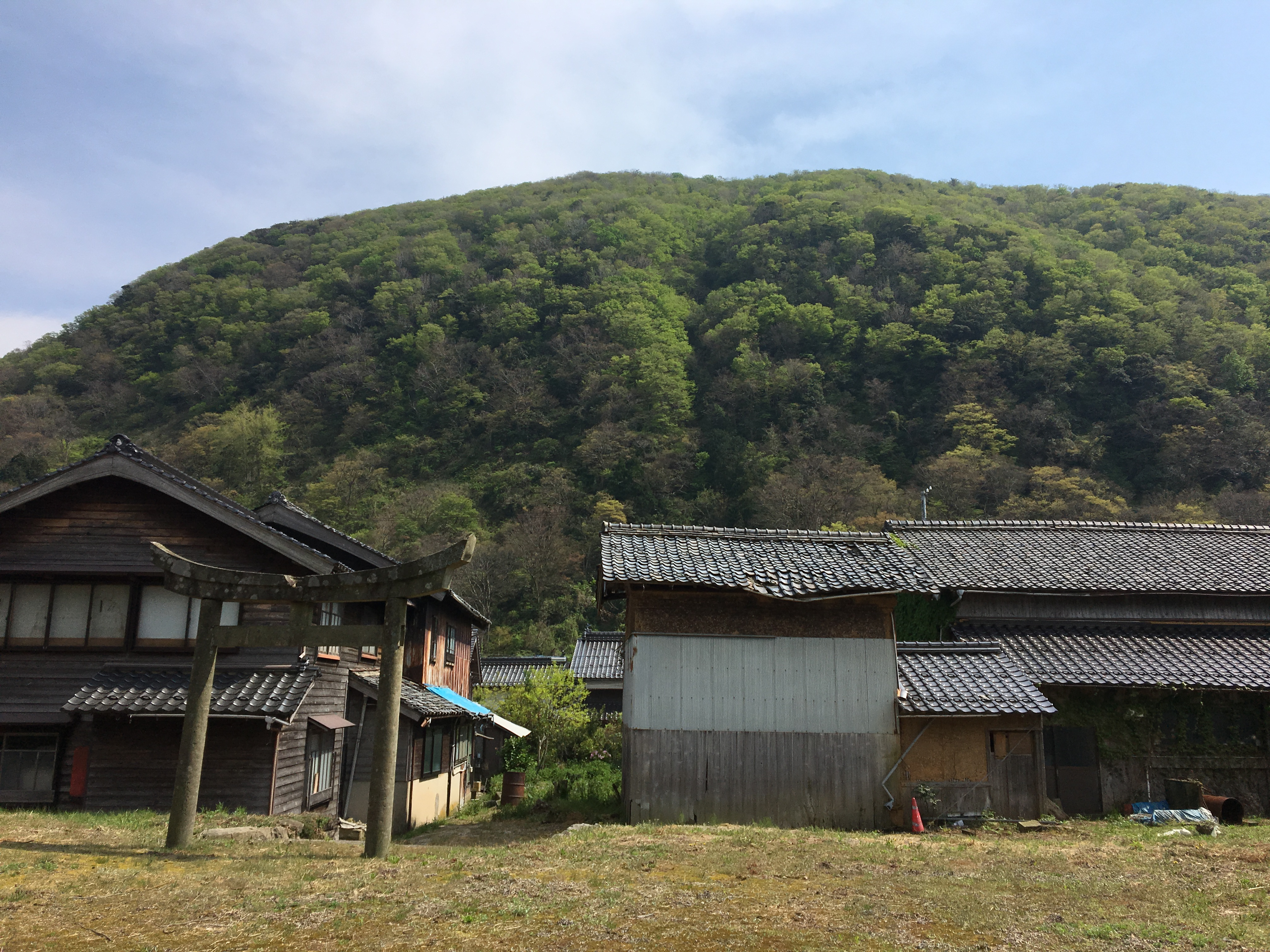 京丹後市丹後町乗原の風景